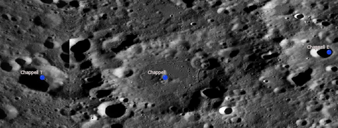 Cráter Chappell (LRO)